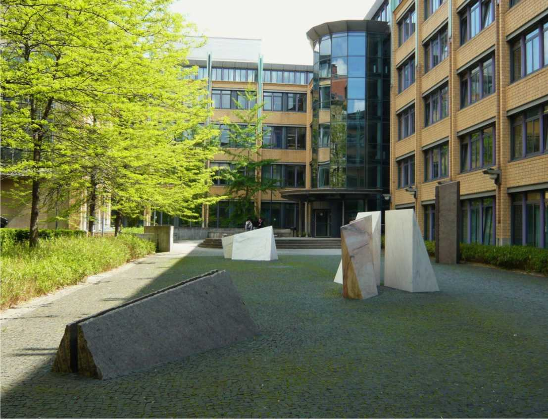 Renate Hoffleit, SKULPTURENFELD, Innenhof des Amts- und Sozialgerichts Stuttgart